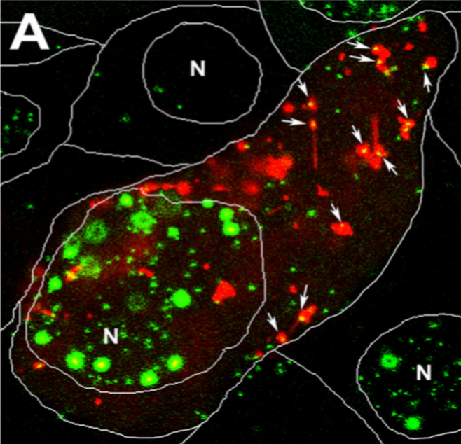 Figura 8. Co-transporte de partículas VP26-GFP y APP-mRFP en células vivas. (A) El primer fotograma de una secuencia de video capturado a las 7–9 h pi. Muchas partículas (64%) virales nacientes VP26-GFP (en verde) se localizan conjuntamente con los compartimentos APP-mRFP (en rojo) en este cuadro que aparece de color amarillo brillante (flechas). Las partículas VP26-GFP viajan con las vesículas APP-mRFP, y a veces se unen y se separan de la APP. Las líneas blancas muestran los límites entre las células y la posición de los núcleos (N).